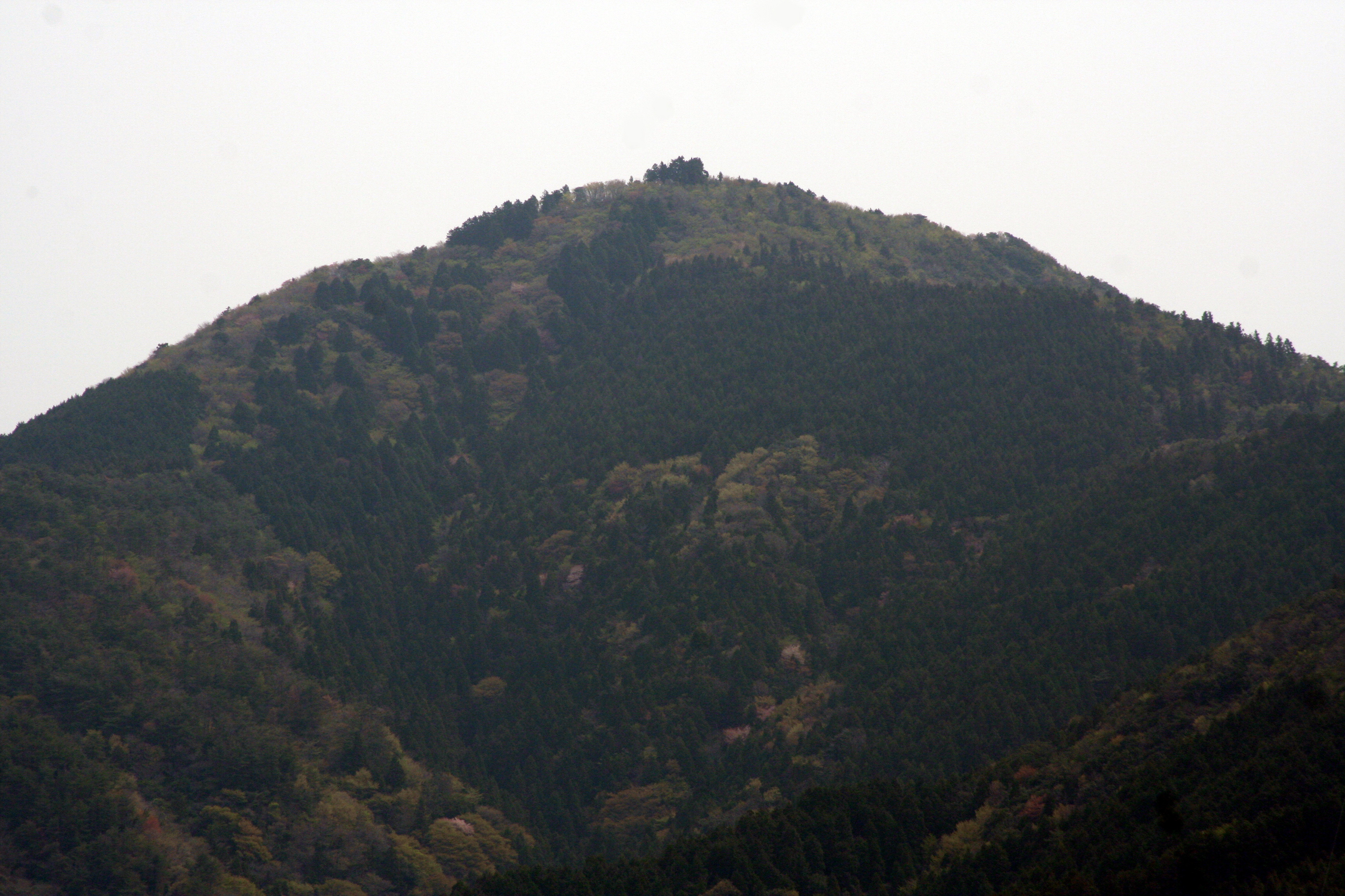 如意ヶ岳から見た桂木山